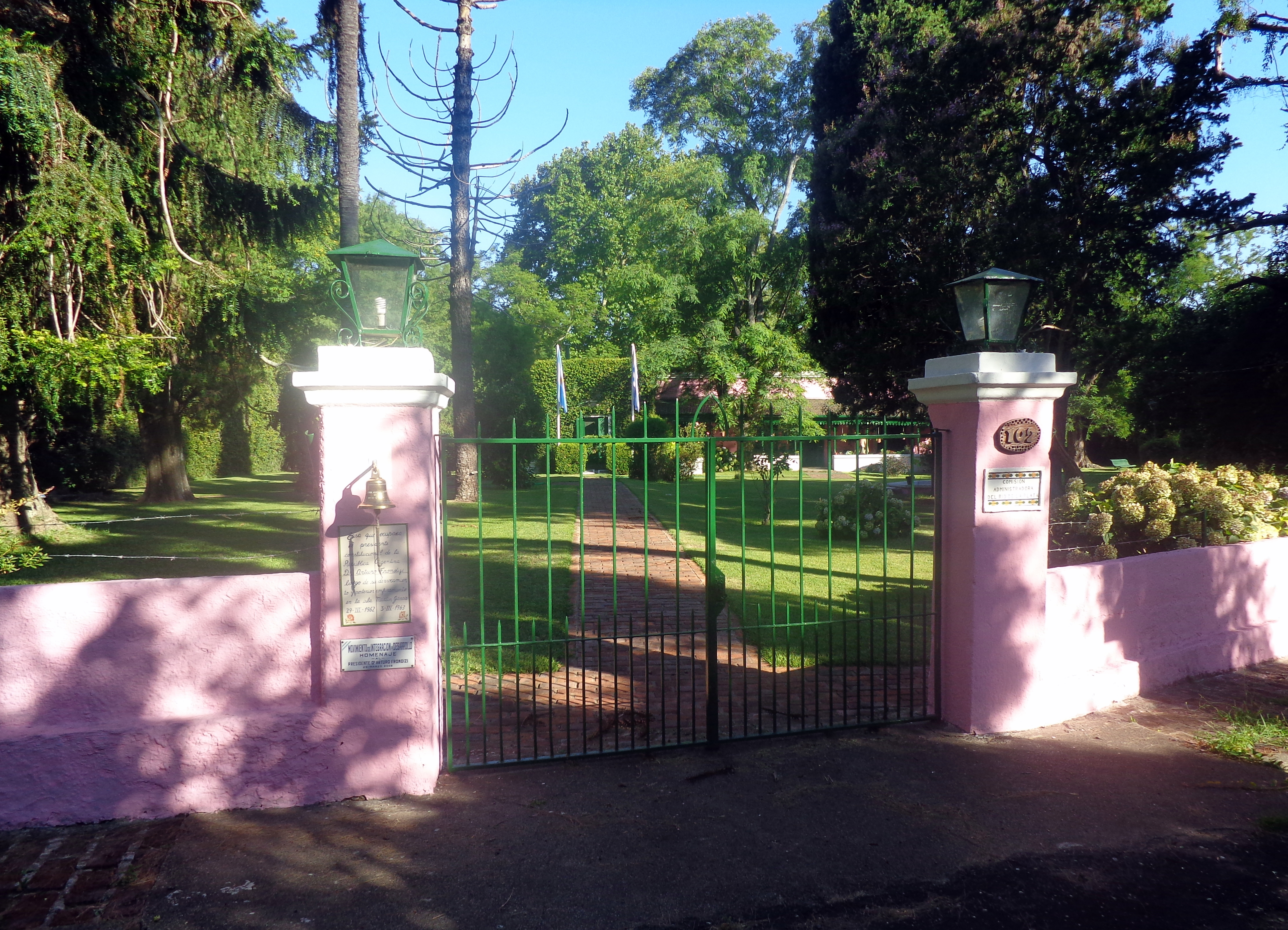 Casa que ocupara en la Isla Martín García (Argentina) el depuesto presidente Arturo Frondizi.